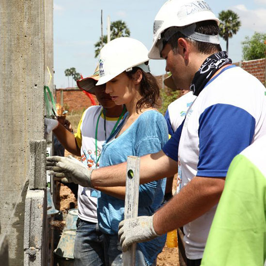 Kulczyk Foundation pomogło wybudować domy w Kambodży_fot. Tatiana Jachyra.